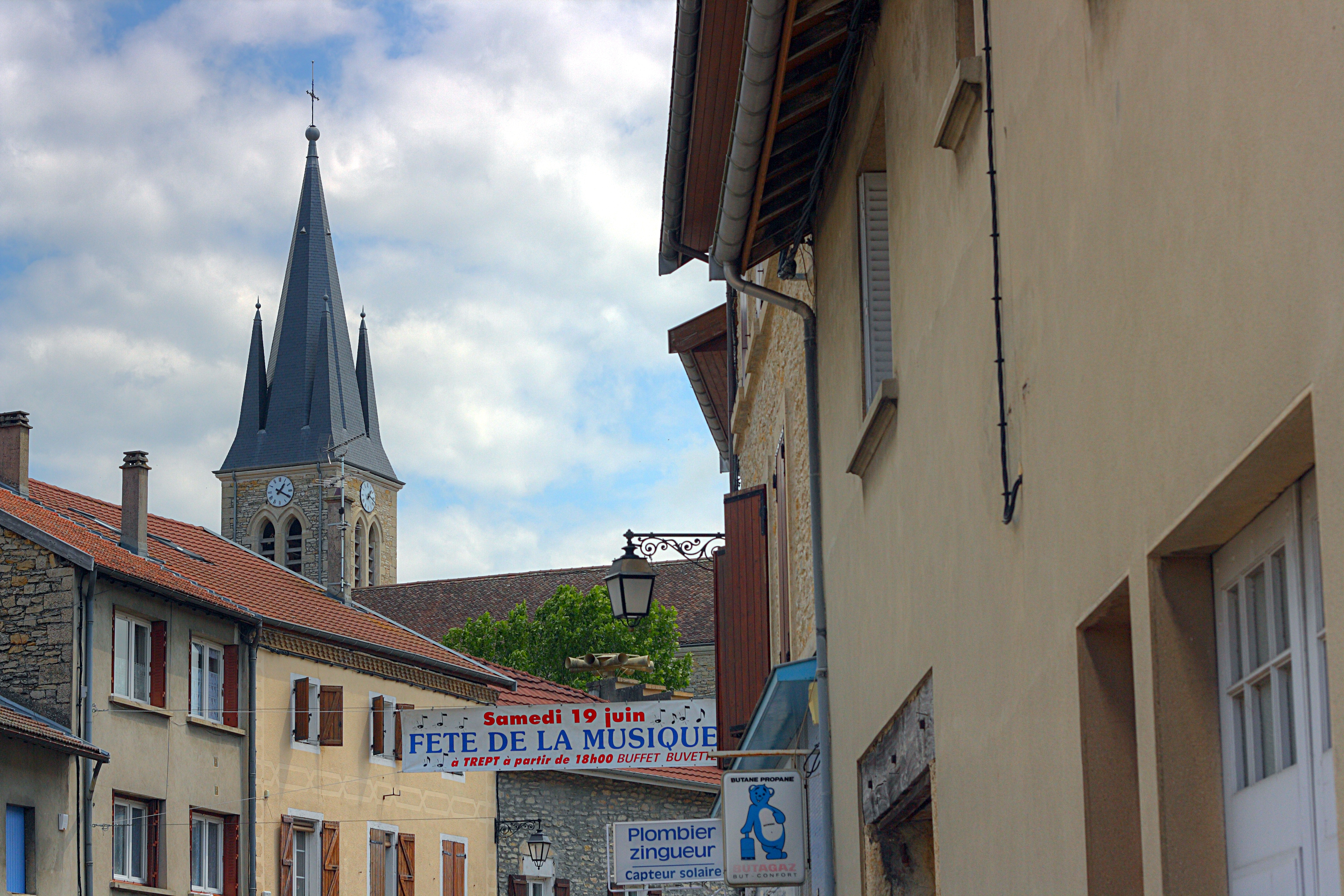 Commune de Trept en Isère dans la région Rhône-Alpes en France. Photo du 21 juin 2010.